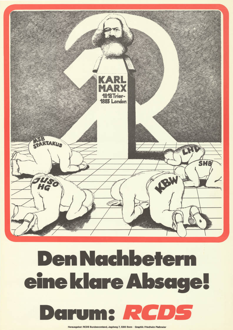 Karl Marx 1818 Trier 1883 London MSB Spartakus Juso HG LHV SHB KBW Den Nachbetern eine klare Absage! Darum RCDSAbbildung:Karl Marx (Porträtfoto) als Säulenheiliger vor Hammer und Sichel und unterwürfigen kommunistischen Studentenvertretungen (Karikatur)Plakatart:Motiv-/TextplakatKünstler_Grafiker:Grafik: Friedhelm PlaßmeierAuftraggeber:RCDS-Bundesvorstand, BonnObjekt-Signatur:10-029 : 17Bestand:Plakate von Hochschulgruppen (10-029)GliederungBestand10-18:Plakate von Hochschulgruppen (10-029) » RCDSLizenz:KAS/ACDP 10-029 : 17 CC-BY-SA 3.0 DE